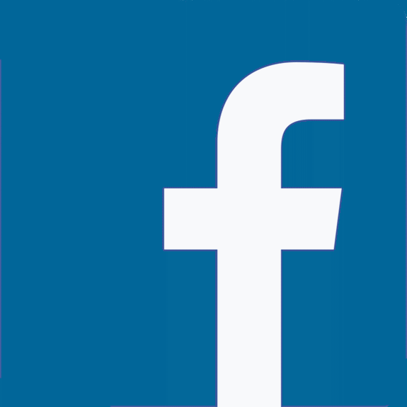 Ikonka k projektu Senioři píší Wikipedii do barvy